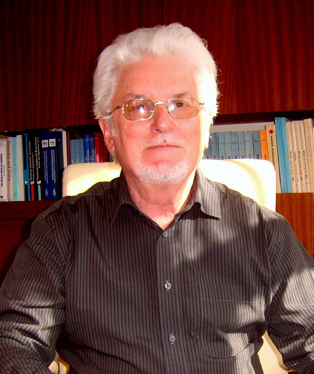 Prof. Dr. Dieter Reinhard Seeliger, Physicist